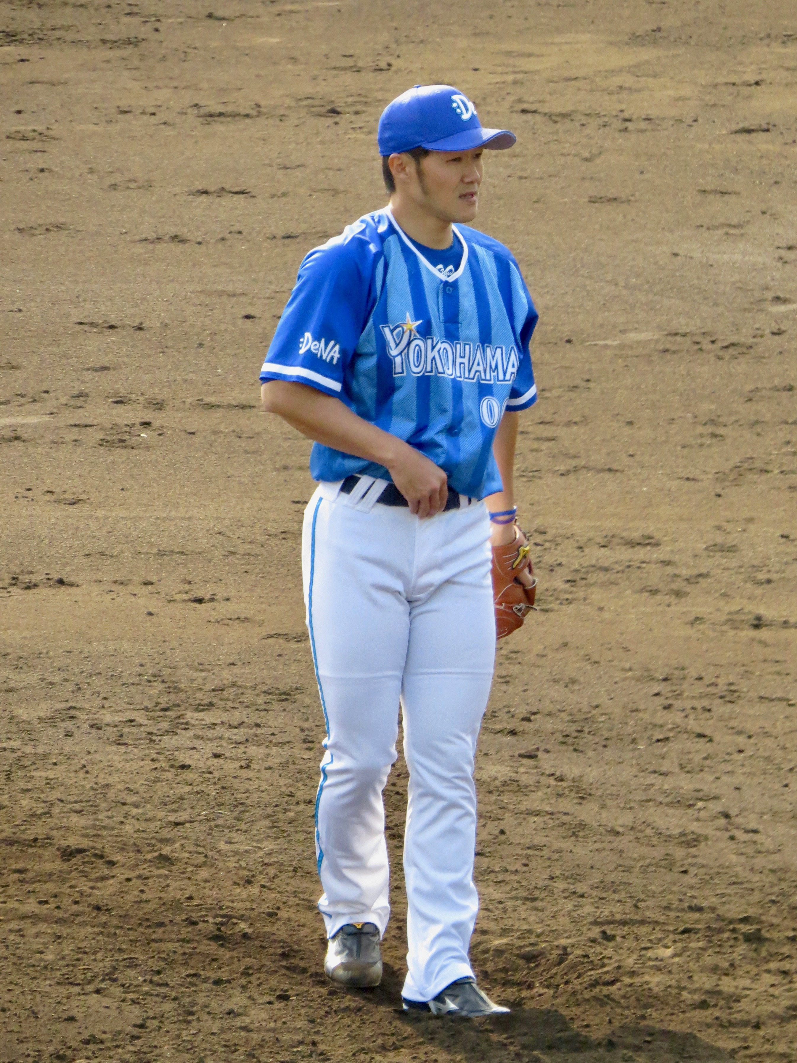 さいたま市営浦和球場にて